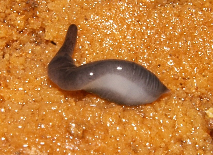 Planaire microplana terrestris dans la grotte de Ribec